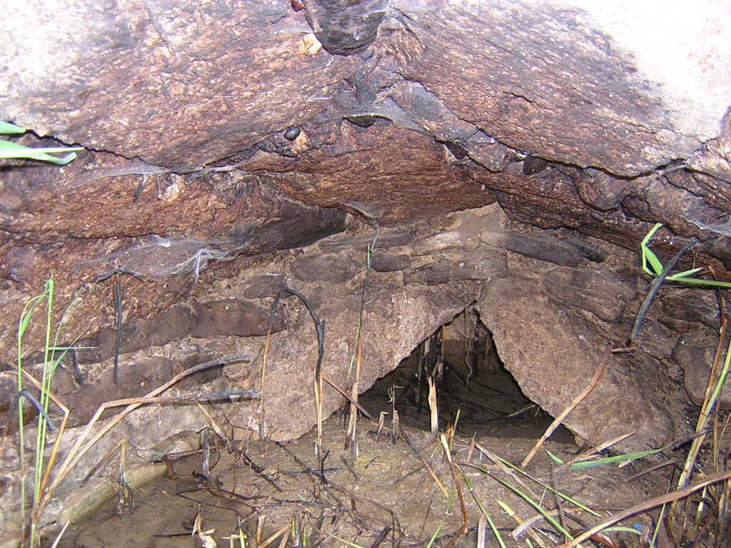 La Font del Reig (Monistrol de Calders, Moianès)